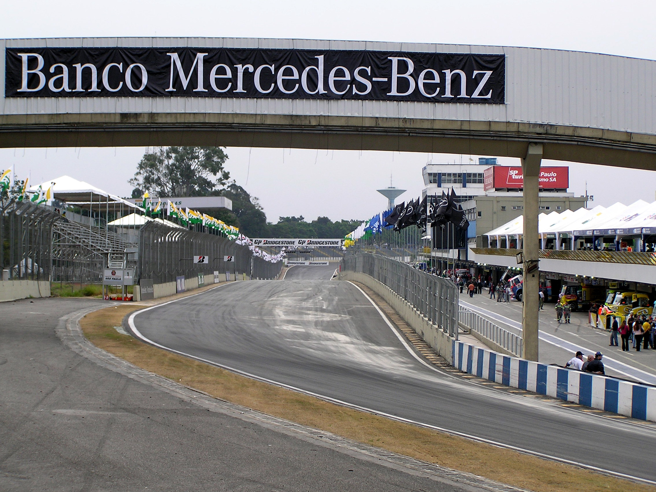 Autódromo José Carlos Pace: Main straight